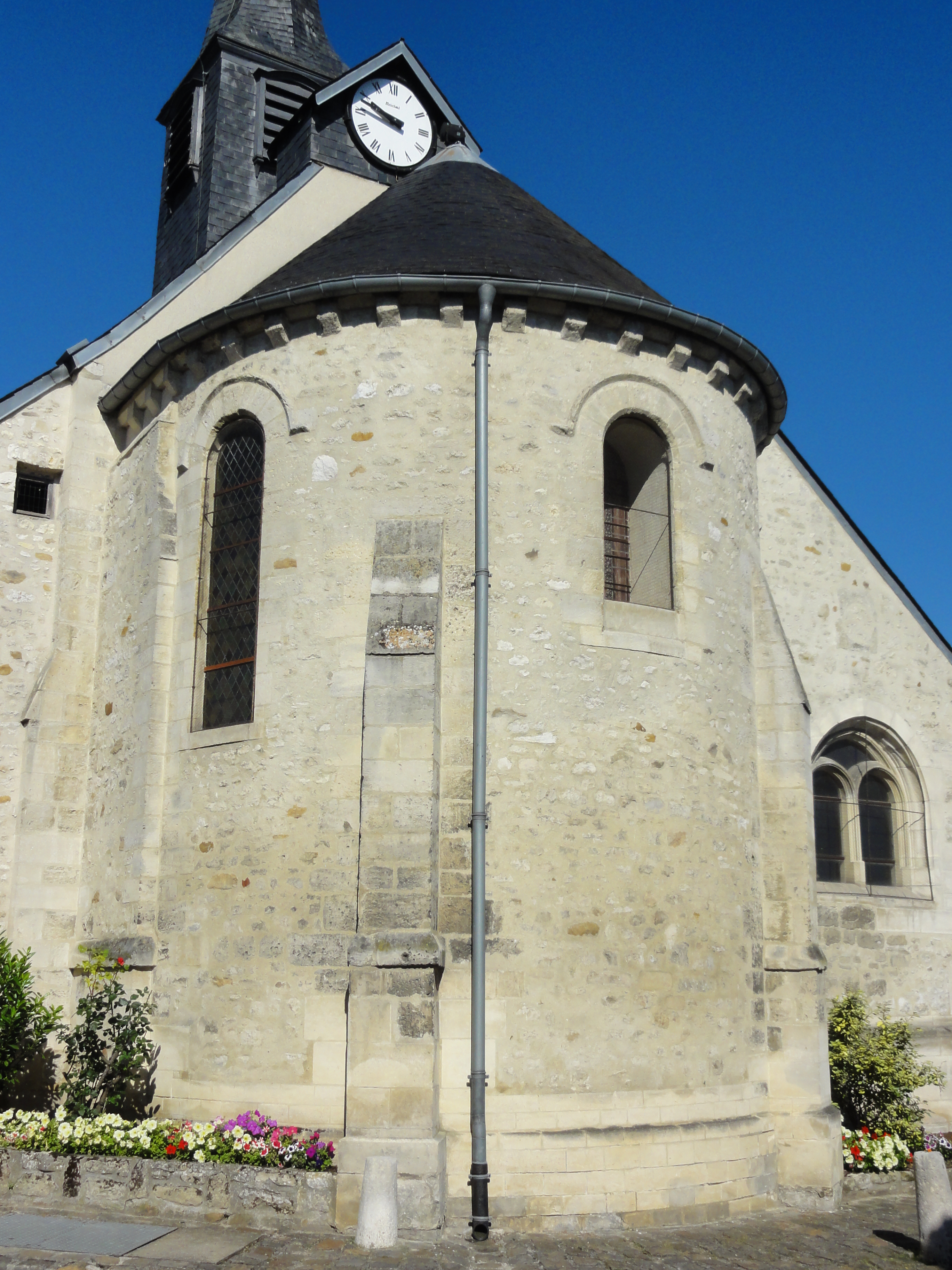 Abside, vue depuis le sud-est.